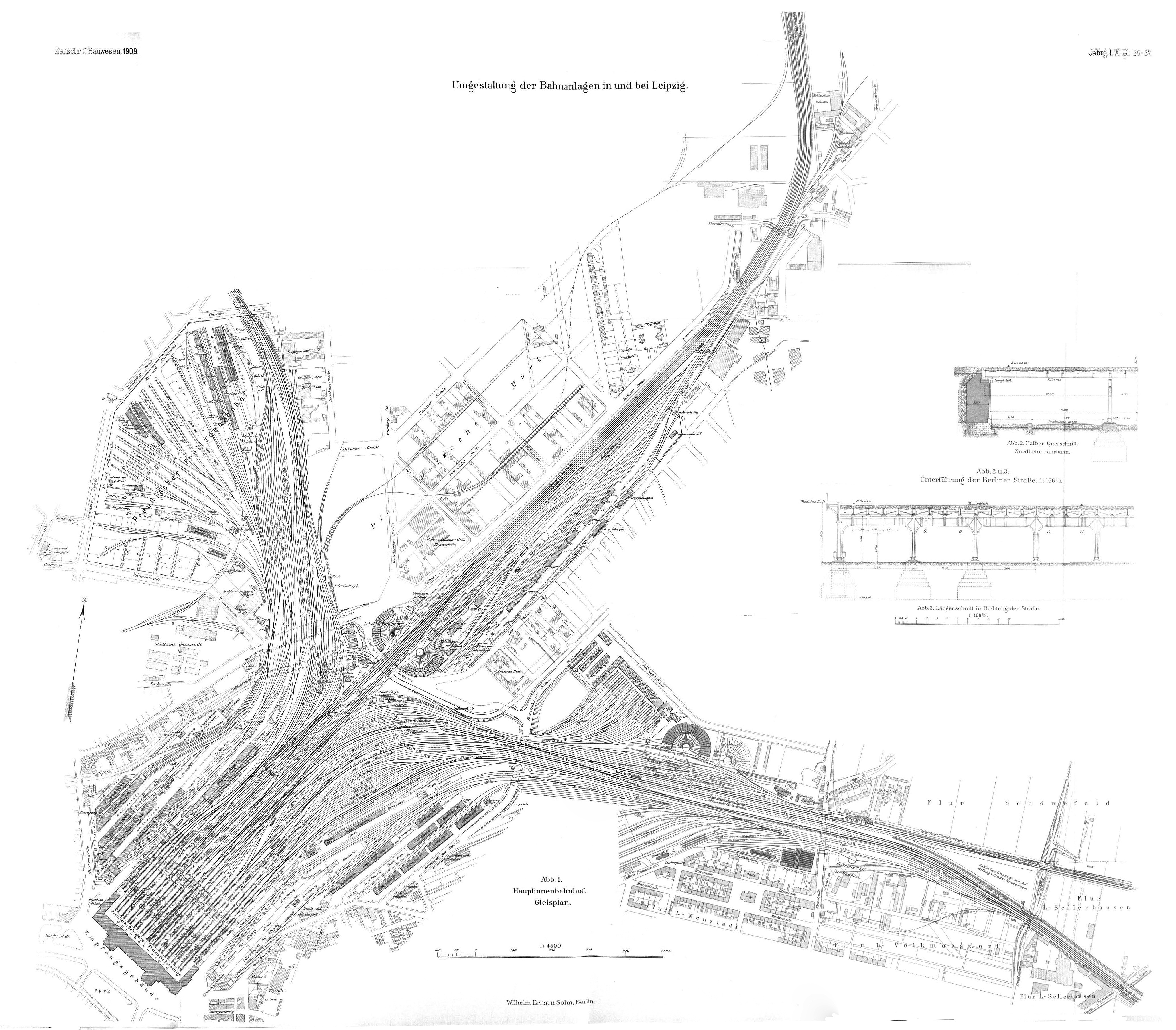 Umgestaltung der Bahnanlagen in und bei Leipzig, Hauptinnenbahnhof, GleisplanDer Hauptinnenbahnhof, der auf dem Gelände des jetzigen Dresdener, Magdeburger, Thüringer, Berliner und des früheren Übergabebahnhofs errichtet und bis auf das Empfangsgehäude zum großen Teil schon fertiggestellt ist, enthält die Anlagen für den Personen- und Güterverkehr beider Verwaltungen.